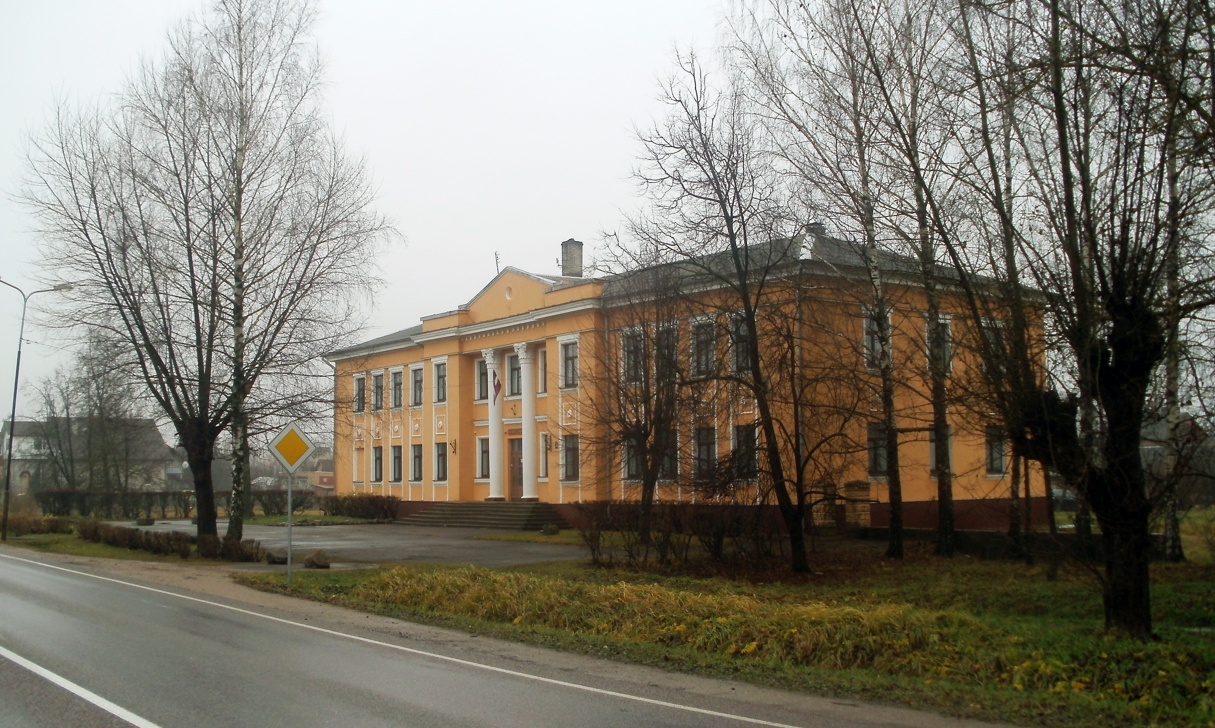 Классы начальной школы, Элея